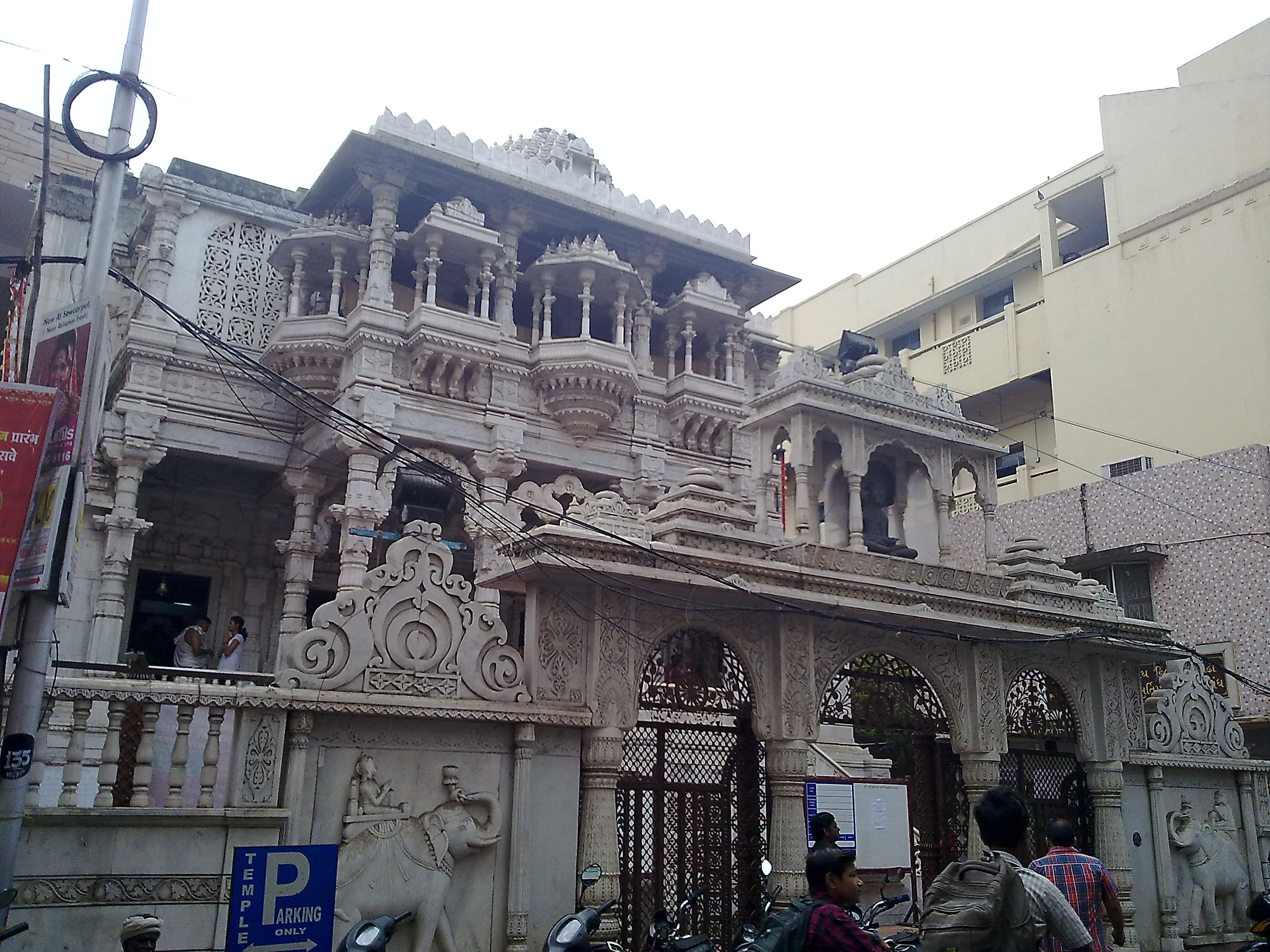 SHREE GUJARATI SWETAMBER MURTIPUJAK JAIN MANDIR